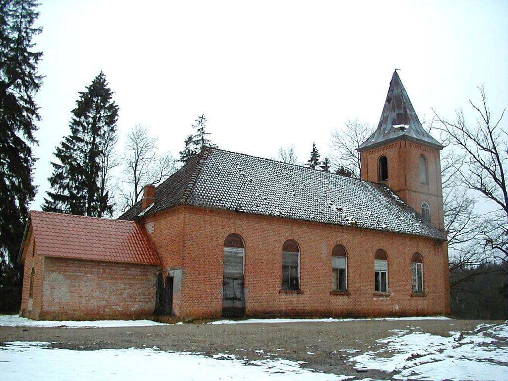 Sēmes baznīca 2001-04-21